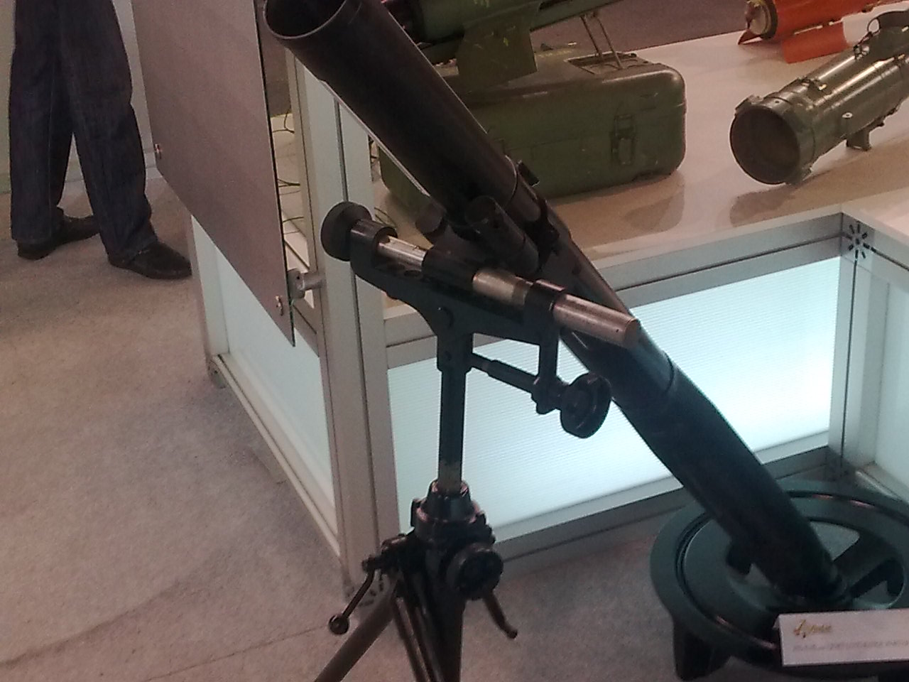 М75 120мм минобацач на сајму